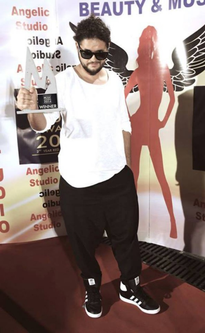 Alex Ceausu a fost desemnat de doua ori la rand cel mai bun regizor din Romania